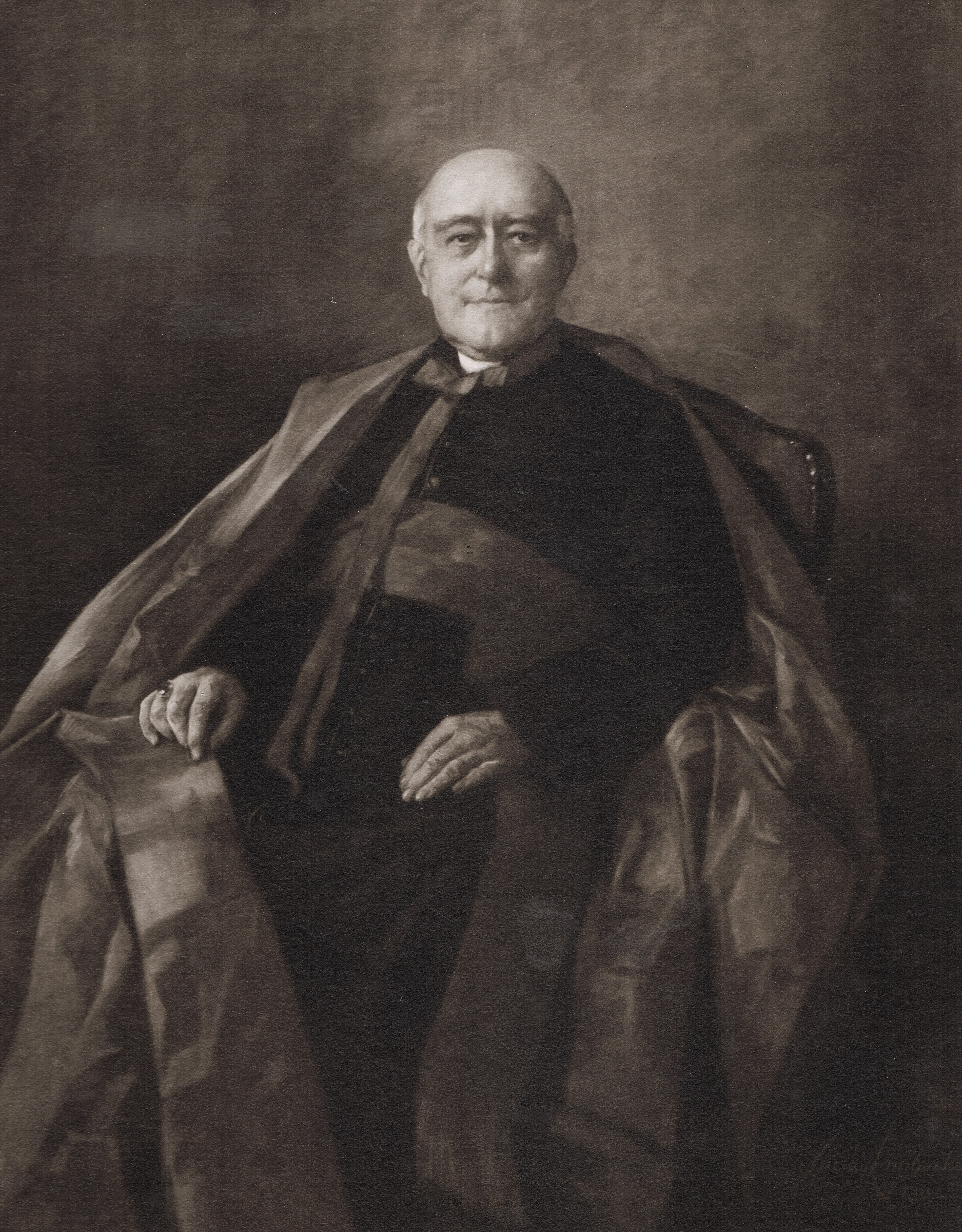 L'historien Louis Duchesne (1843-1922), pastel par Zoé Lucie Betty Lambert de Rothschild, signé Lucie Lambert, daté de 1911, don de l'original par le docteur Paul Miniac (1927-1995) à la Ville de Saint-Malo en 1972. Cliché collection Marie-Anne Miniac, Rennes, France.